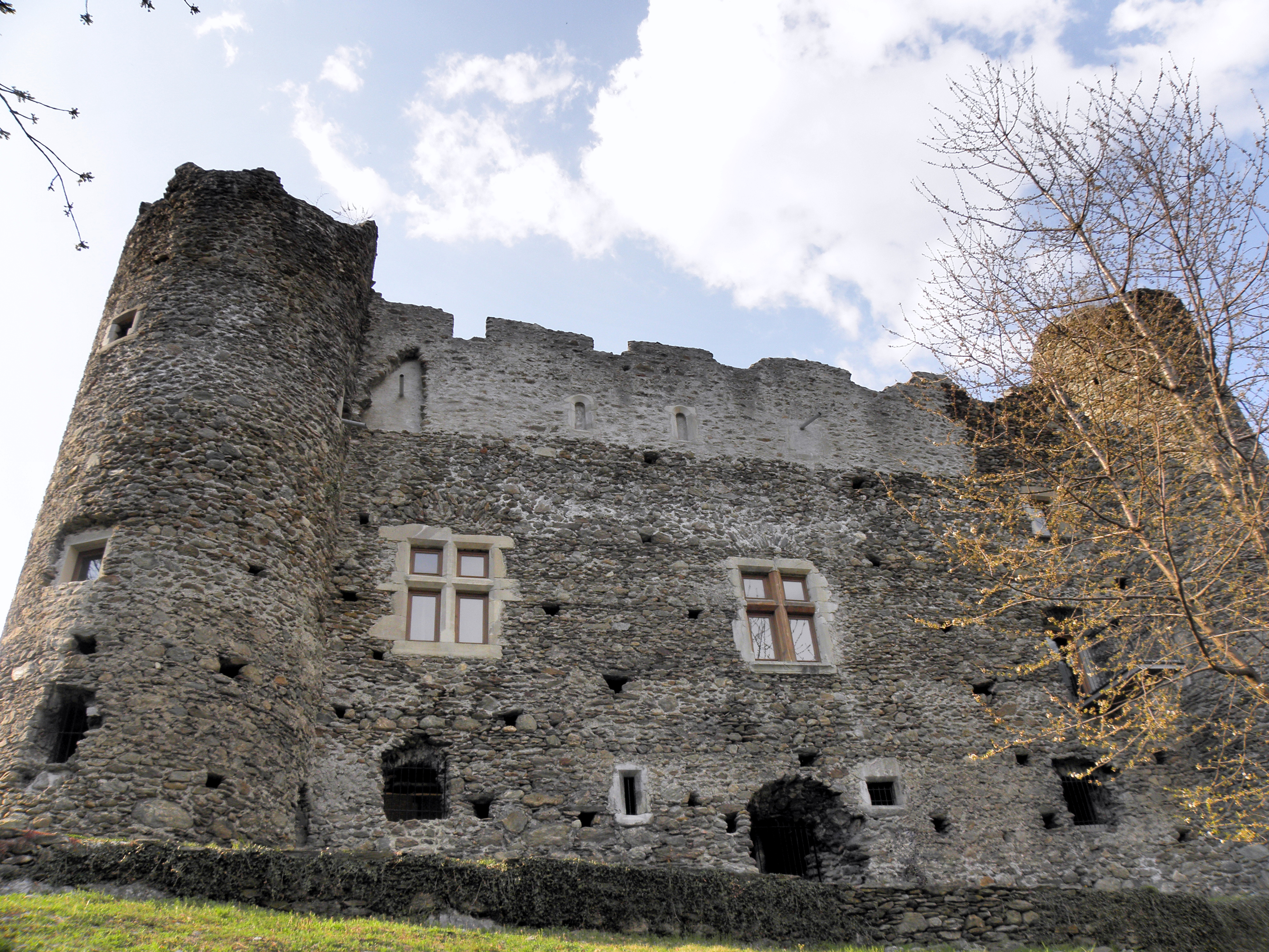 Manoir ou Maison forte de Blay. XIVe - XVe siècle. Commune d'Esserts-Blay.